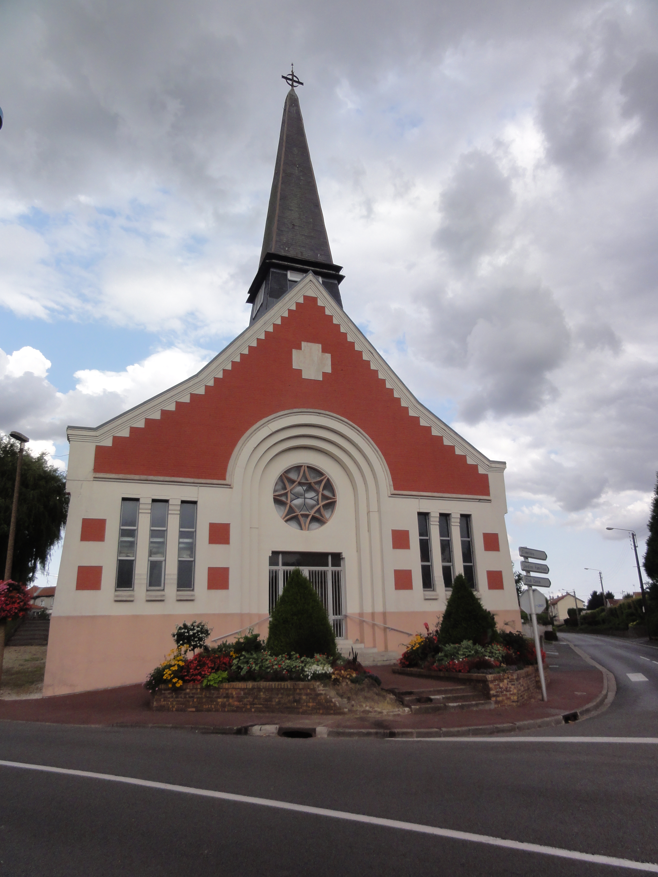 Gauchy (Aisne) église